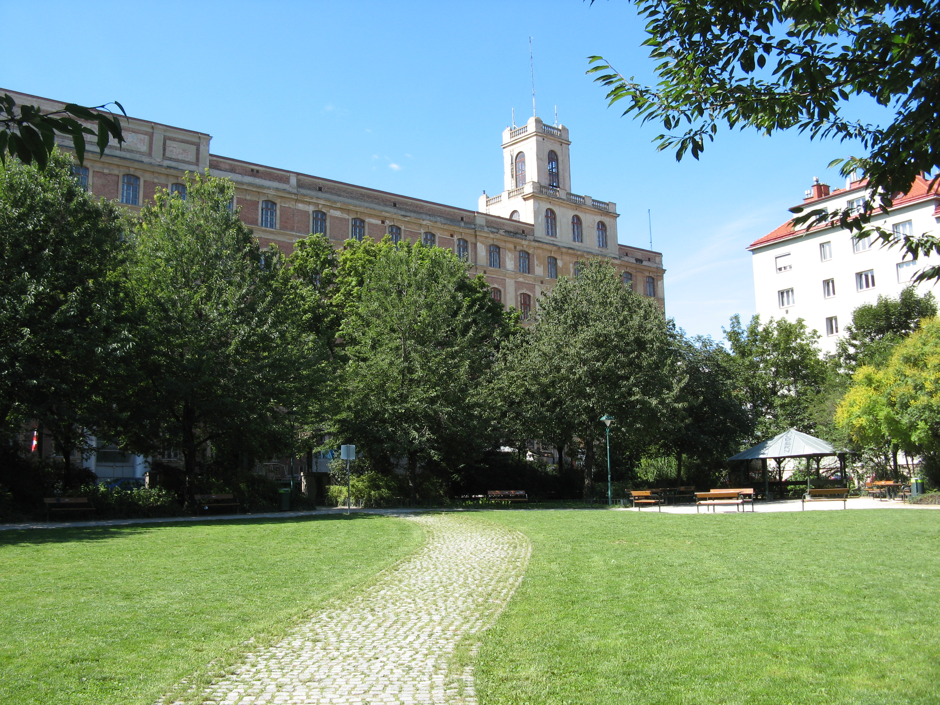 Barankapark und ehemalige Schokoladefabrik Heller, Belgradplatz, Wien-Favoriten